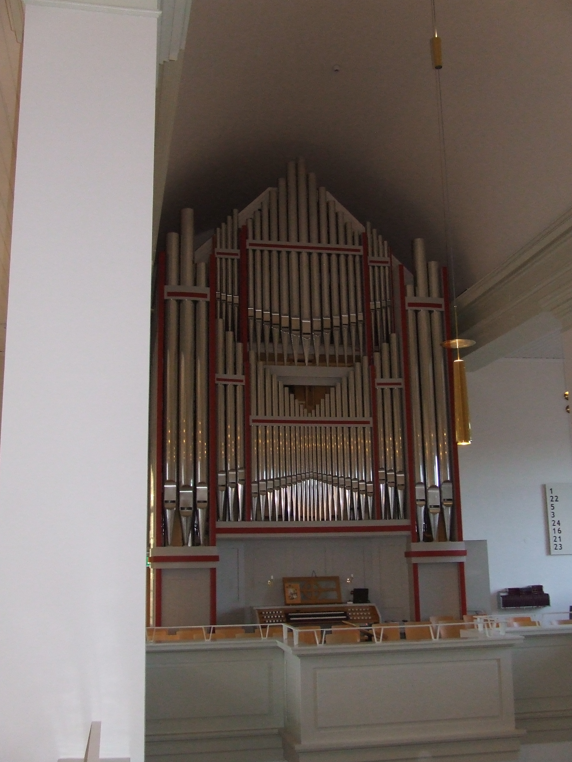 Haminan Marian kirkon urut